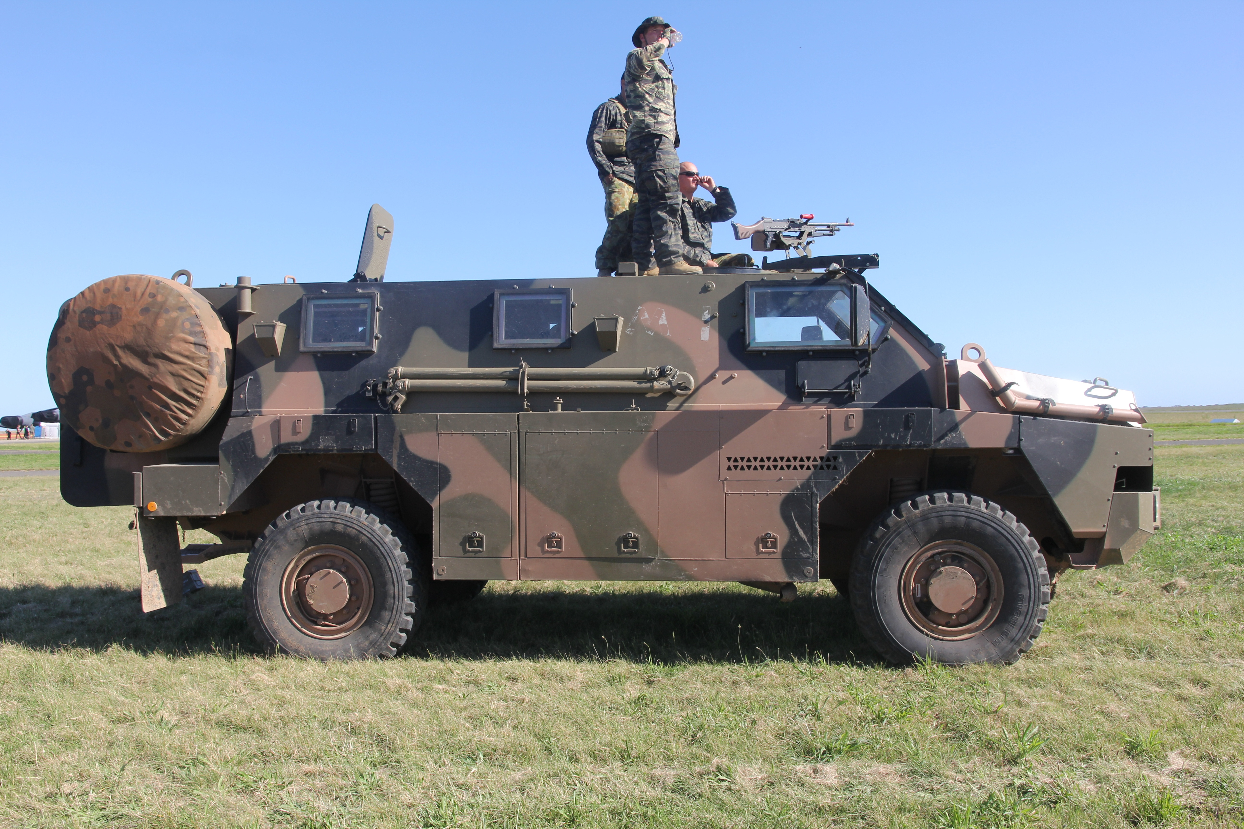 Avalon IMG_7663